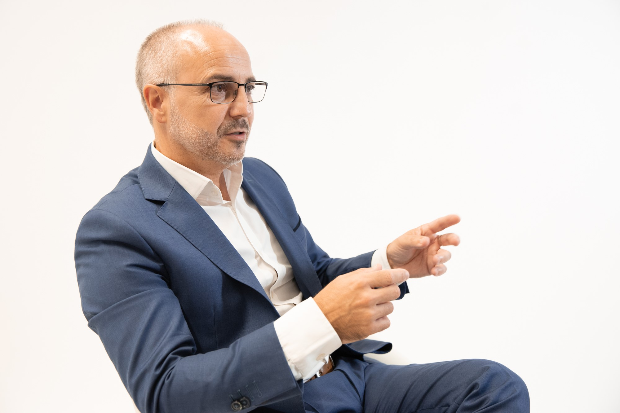 El consultor acaba de presentar Desprivatizar los partidos, libro coescrito con el sociólogo Gómez Yáñez sobre la organización interna de las formaciones políticas. "Dentro de los partidos tiene que haber también división de poderes" sostiene el vicepresidente de la prestigiosa agencia de comunicación Llorente & Cuenca